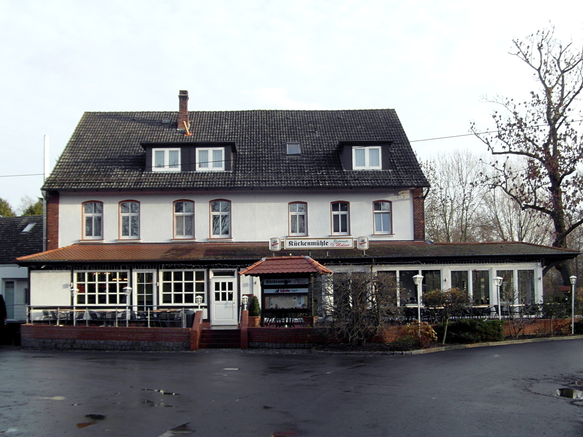 Die frühere Wassermühle Kückenmühle in Kückenmühle (Ronnenberg) wurde zu einem Hotel und Restaurant um- und ausgebaut.